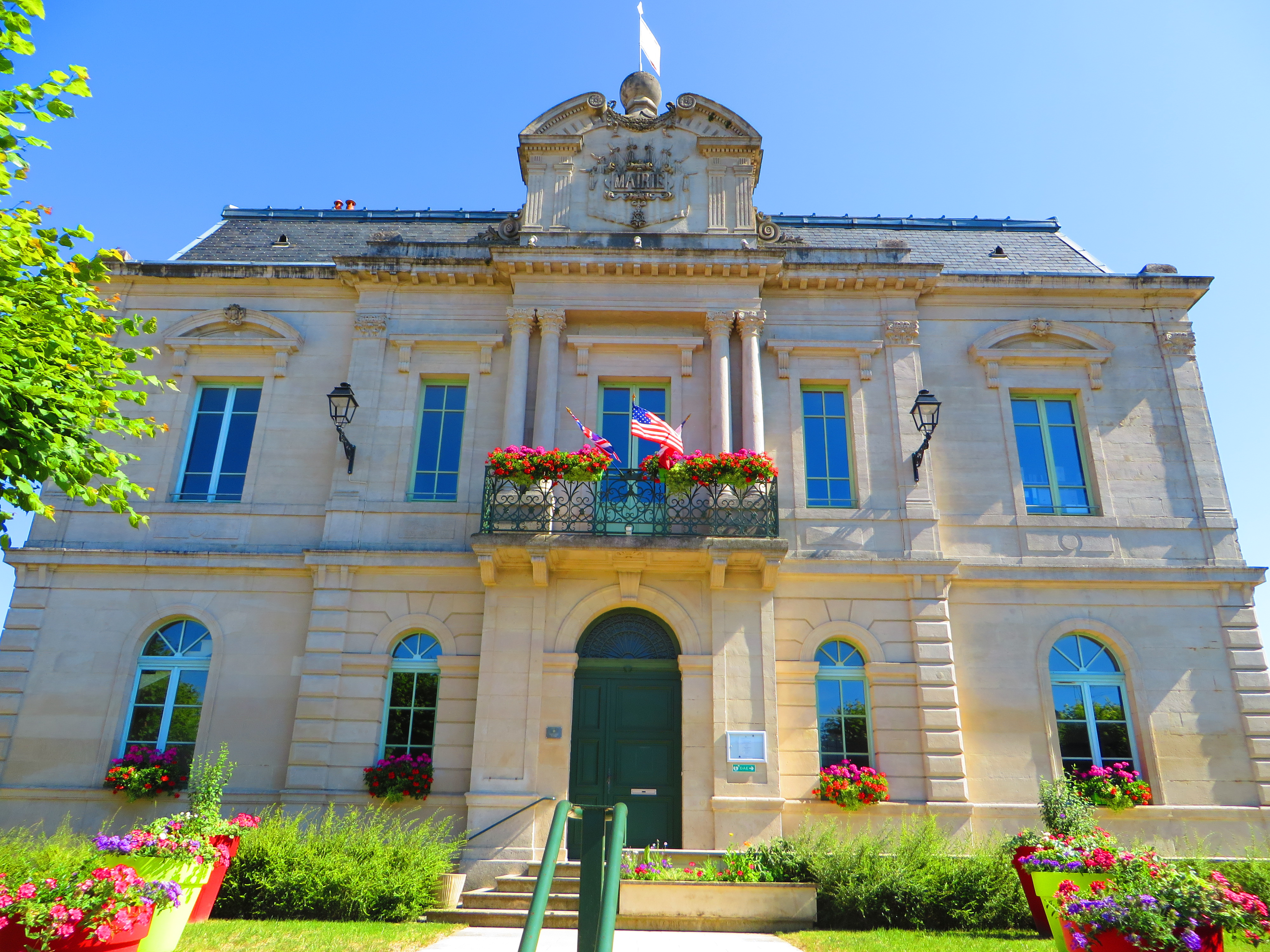 Sampigny 55 mairie